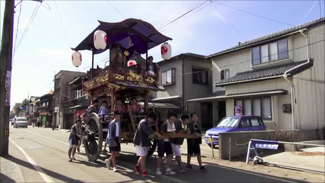 中条祭りの台輪（新潟県胎内市）